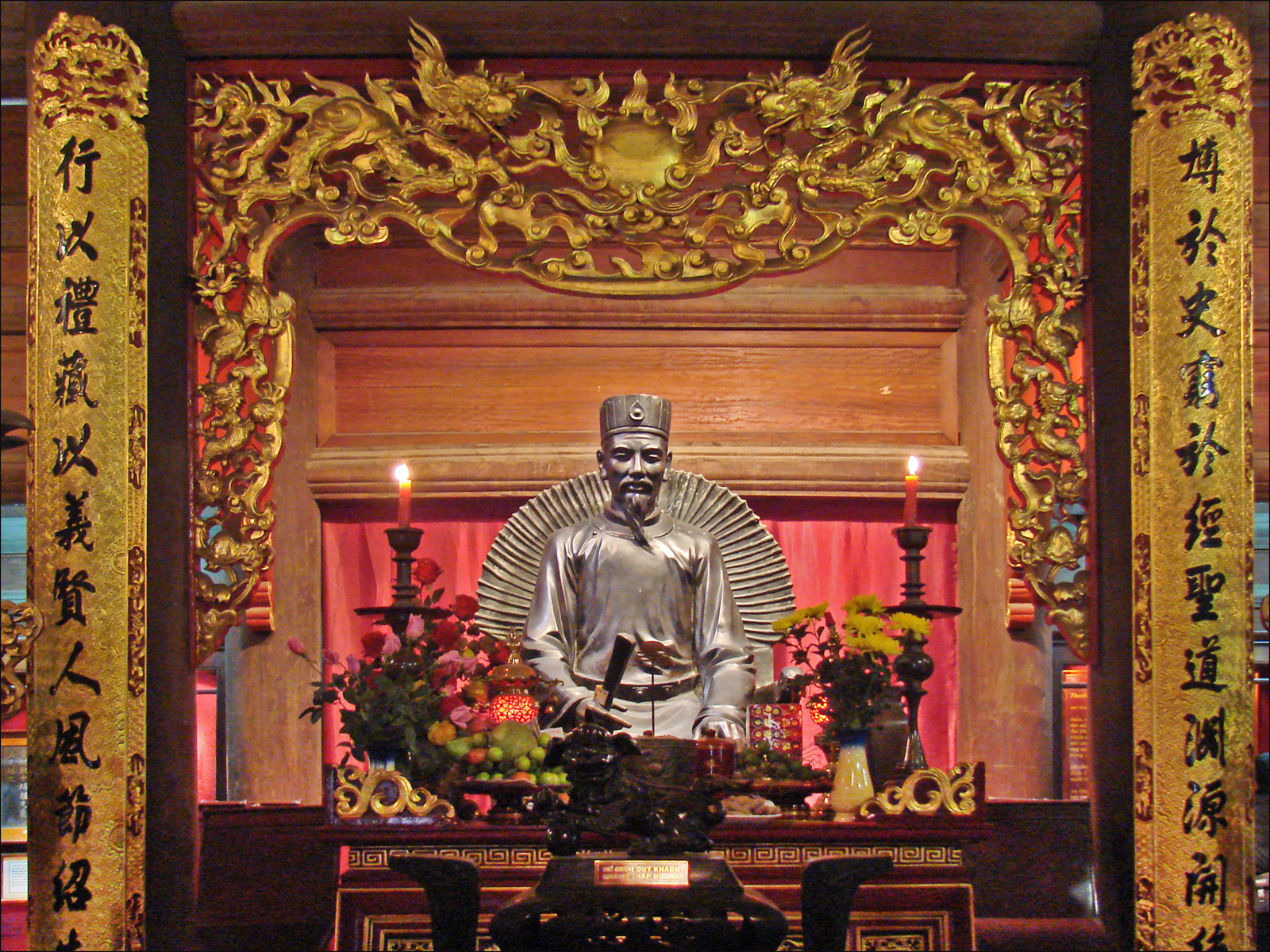 Confucius est né en l'an 551 avant notre ère, à Qufu, en Chine. Il a fait l'objet d'un culte à titre posthume, jusqu'à être nommé "Dieu Suprême" en Chine. Plusieurs temples lui sont consacrés, dans les grandes villes chinoises et d'Extrême-Orient, sur le modèle de celui de Qufu. Le confucianisme a eu un fort impact sur la culture, la psychologie et l'éthique des chinois et d'autres peuples des pays voisins, y compris au Vietnam. Confucius a été honoré comme “l'Enseignant de dix mille générations”. Le Temple de la littérature à Hanoi a été érigé en 1070 par les souverains Ly sur ce modèle. Une Académie nationale a été ajoutée au Temple en 1076. Elle a été transformée en Collège National qui est resté à Hanoi jusqu'en 1807 où il a été transféré à Hué. En partie détruit par la Guerre, le Temple a été reconstruit en 1954.